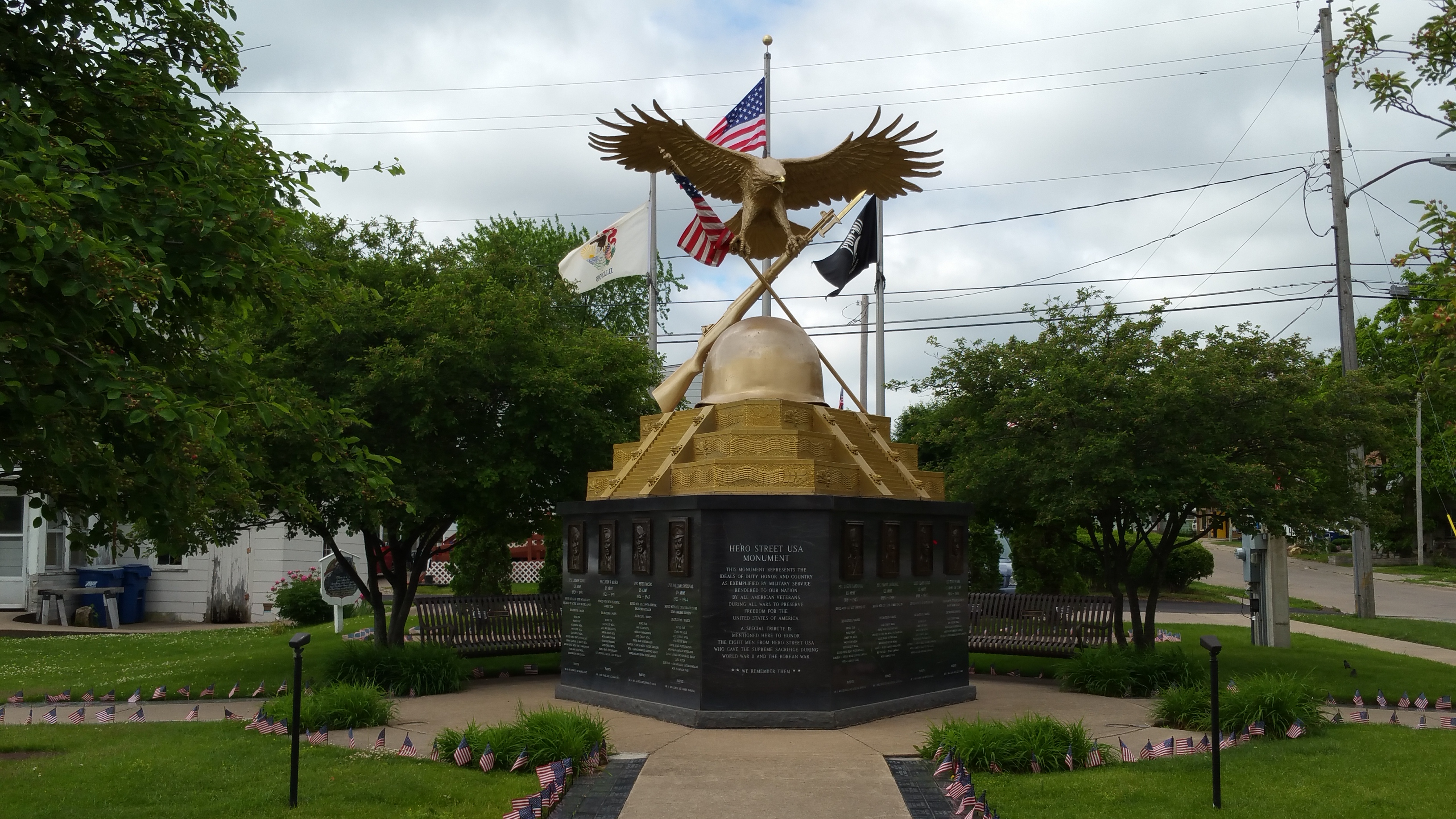 Hero Street Monument in Silvis, Illinois